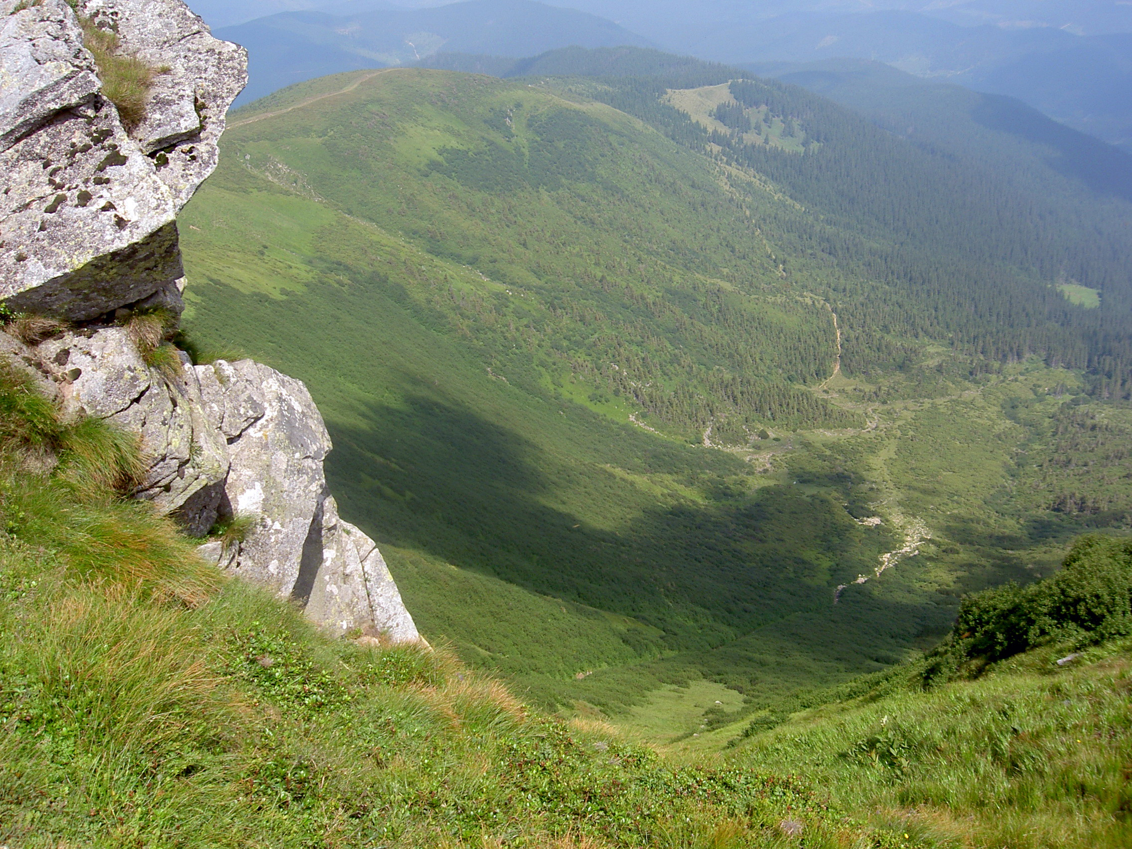 Karpaty, pohled při stoupání na Hoverlu